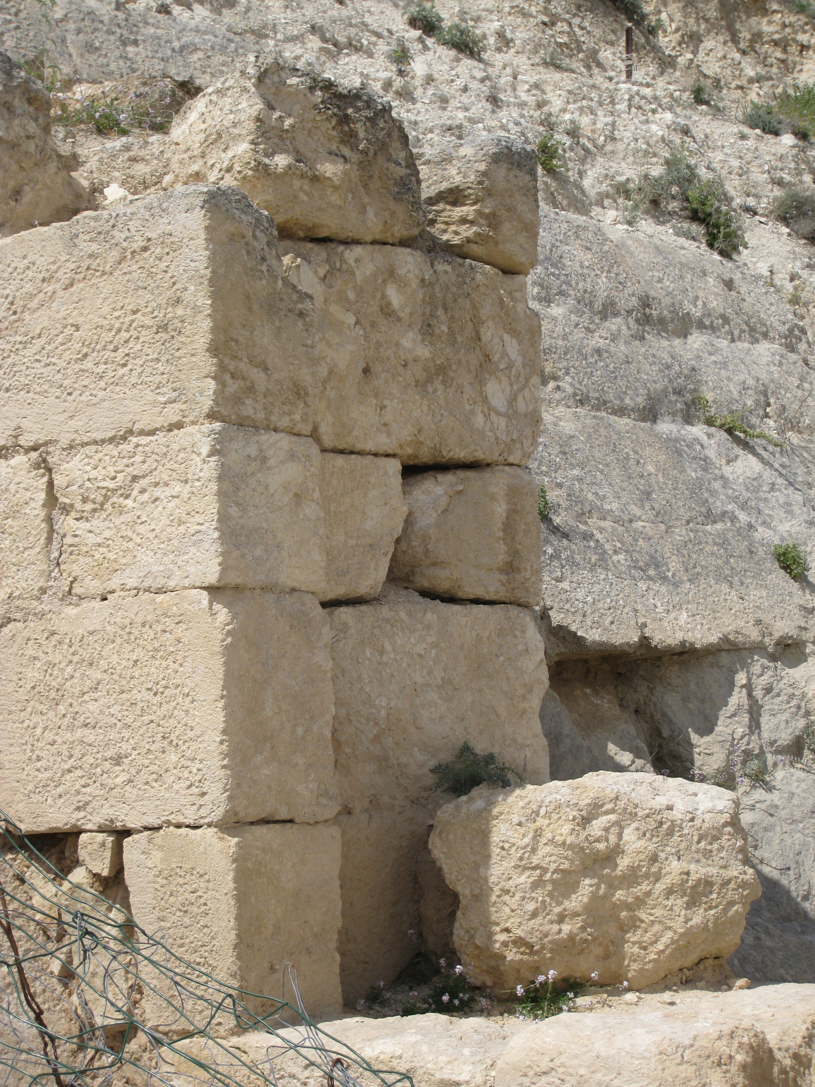 Herod's tomb in Herodion (Herodyon, Herodium) שרידי קבר הורדוס, הרודיון